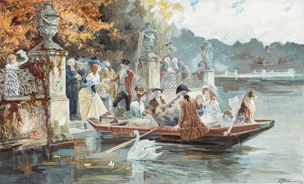 Festliche Gesellschaft in Rokoko-Kostümen zu Boot in herbstlicher Parklandschaft. Gouache. 60 x 98 cm Sign. und 1909 dat.